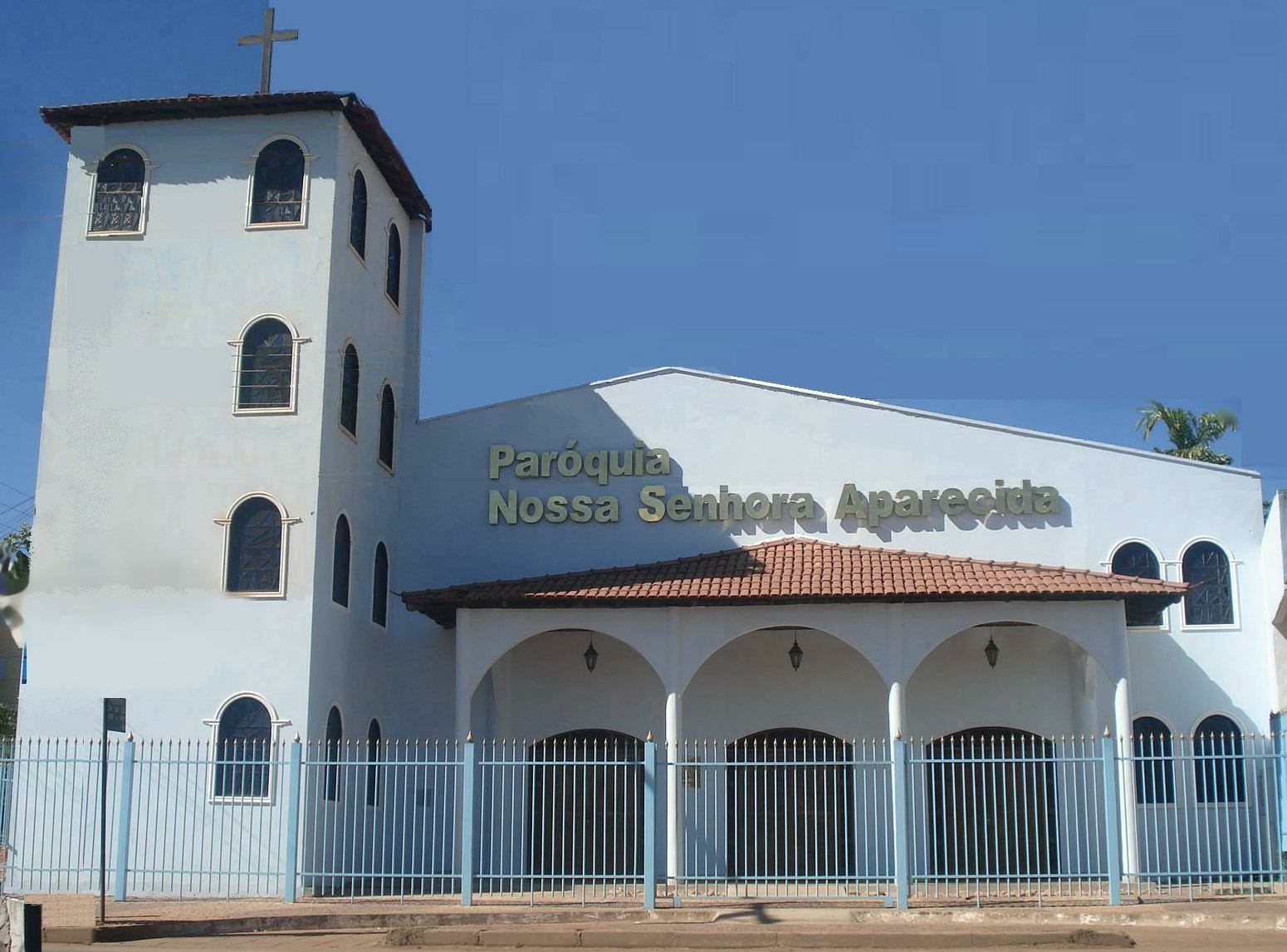 Igreja católica central da região administrativa de Samambaia, Distrito Federal, Brasil